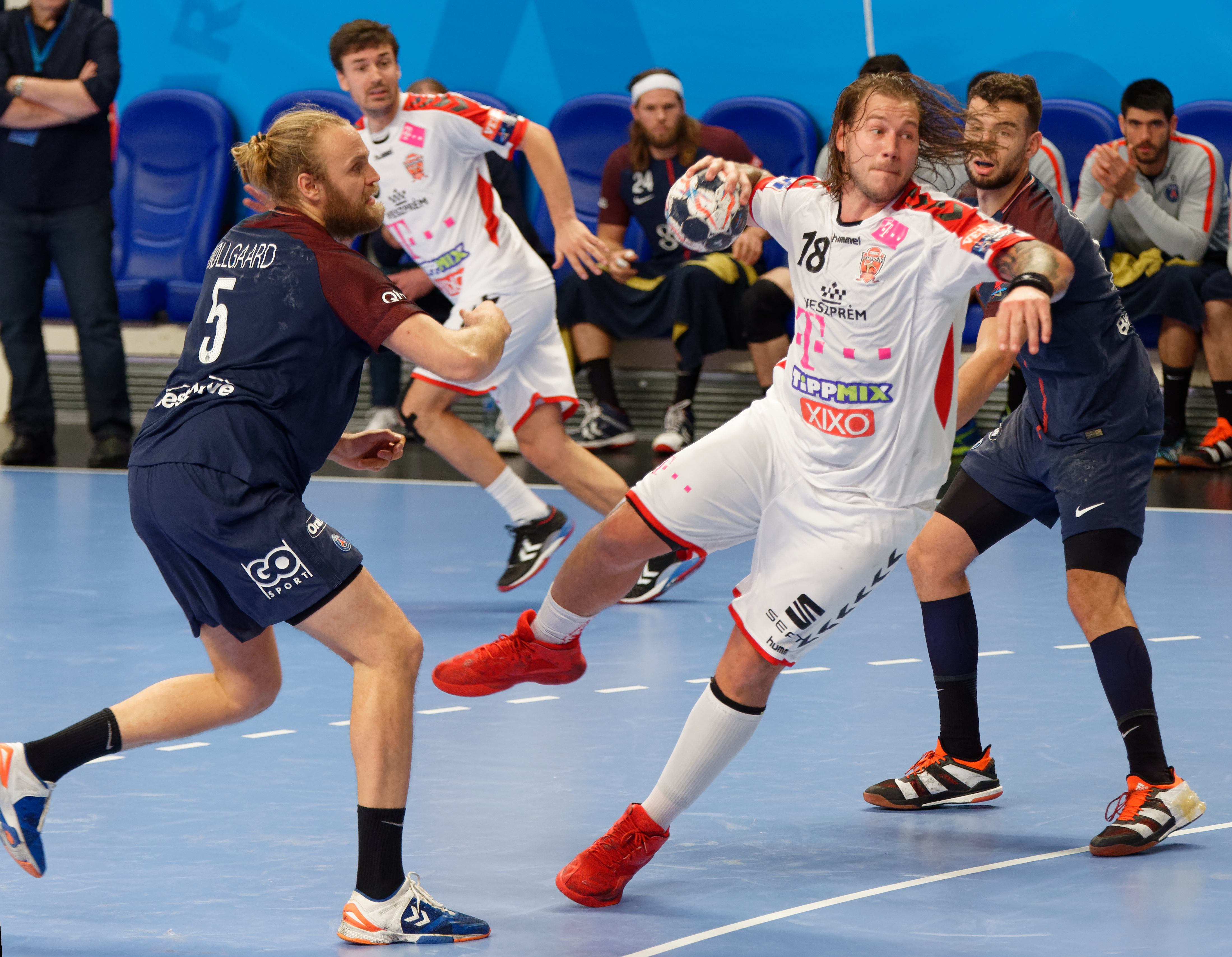 Rencontre de phase de groupe de la ligue des champions 2017/18 entre le PSG et Veszprem. A Coubertin, le 12 novembre 2017.